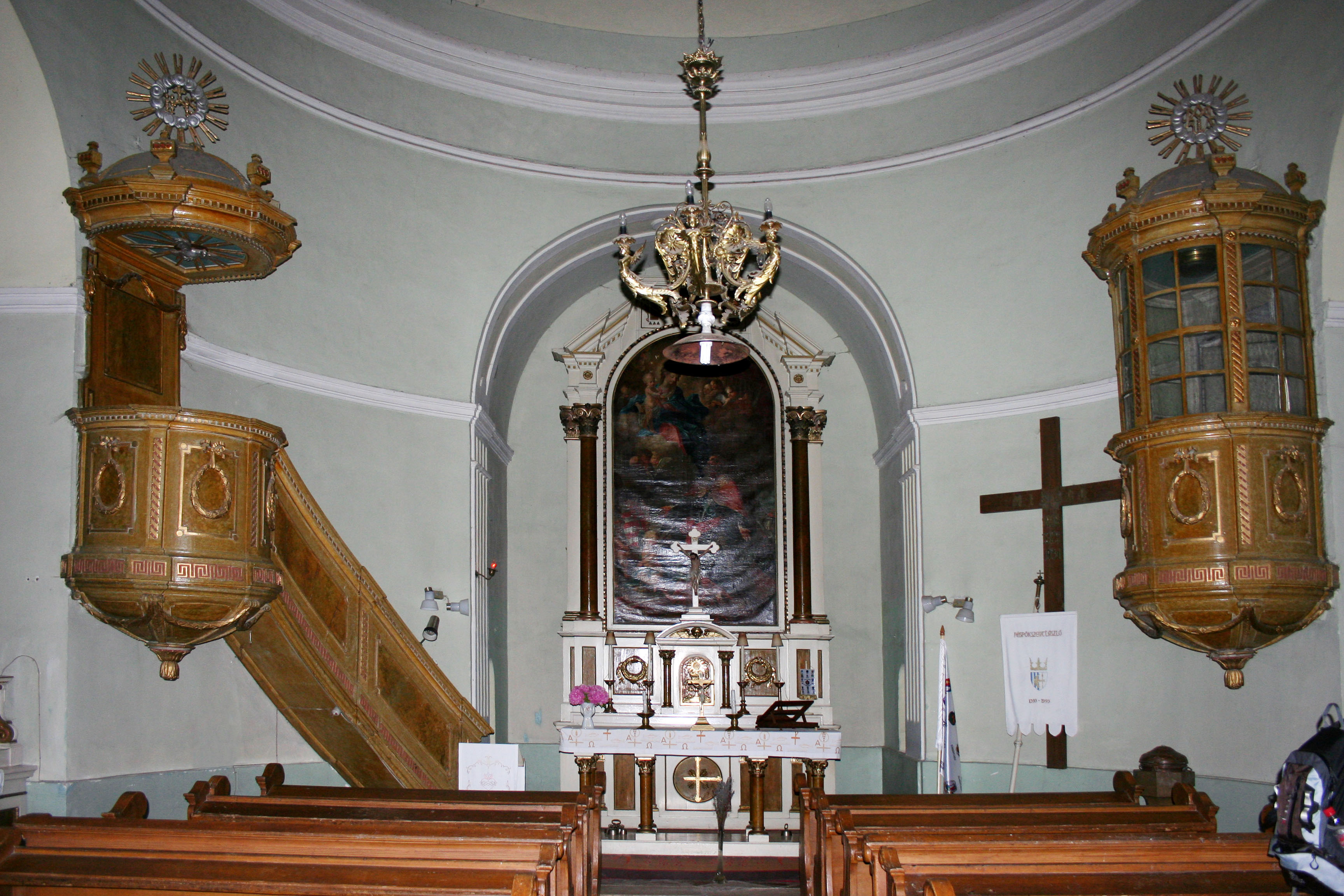 Püspökszentlászló - templom belső